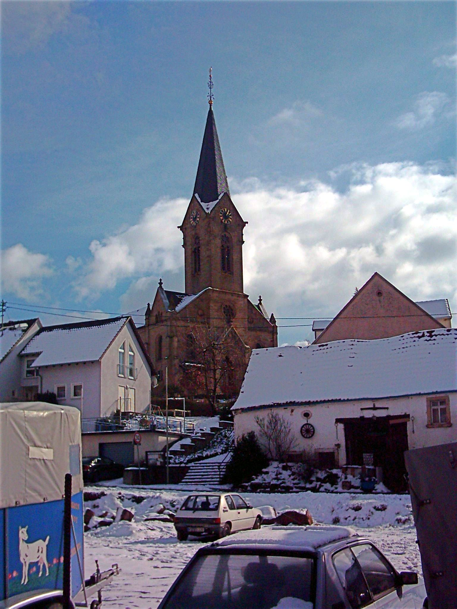 Möglichkeiten zur Lizenzierung, bitte die nicht-benötigte Variante aus dem Code löschen: (Original text: Olsbrücken - Ev. Kirche.)